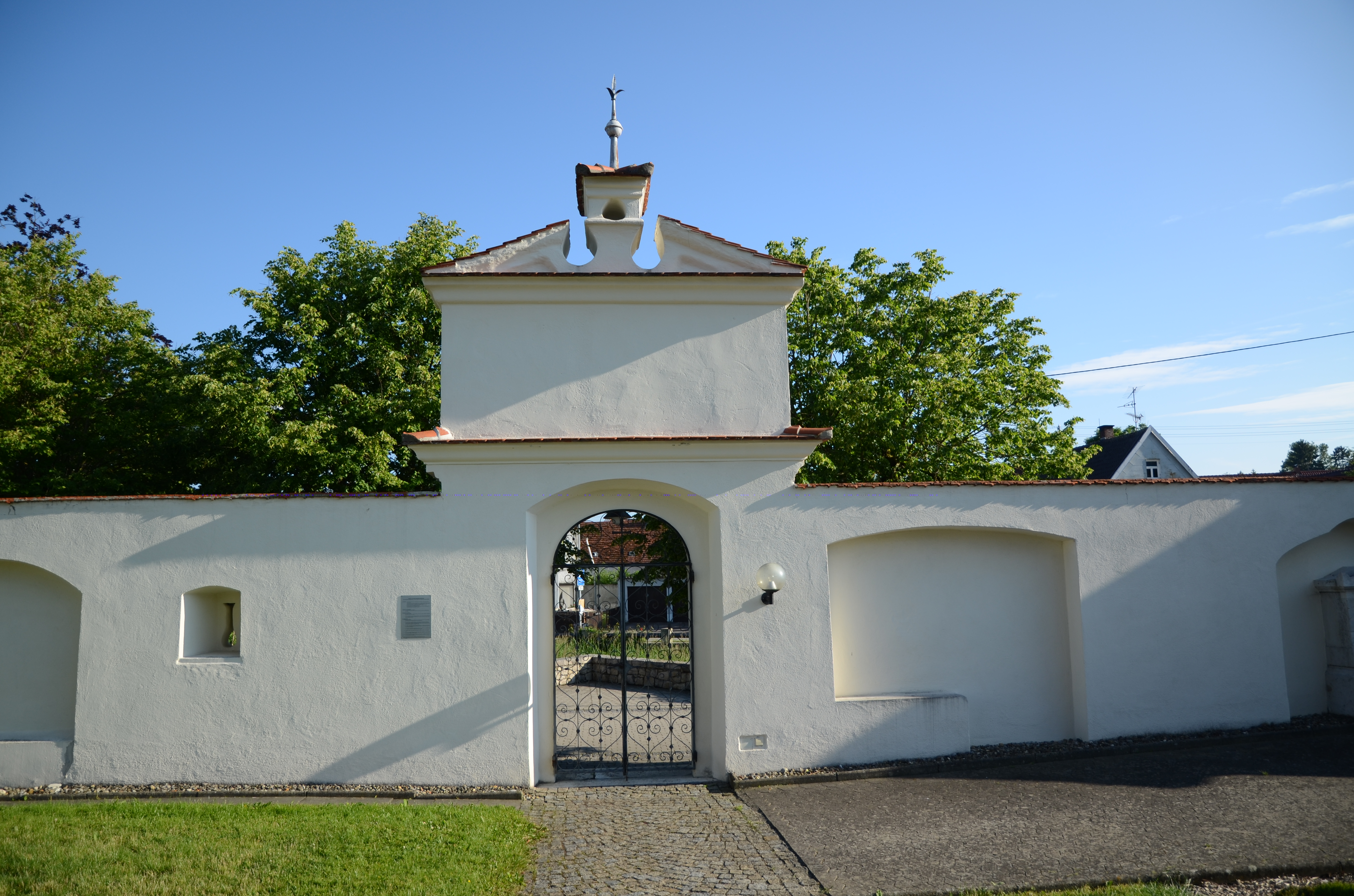 Eingangsprotal zum Friedhof und der Dreifaltigkeitskirche in Haunsheim